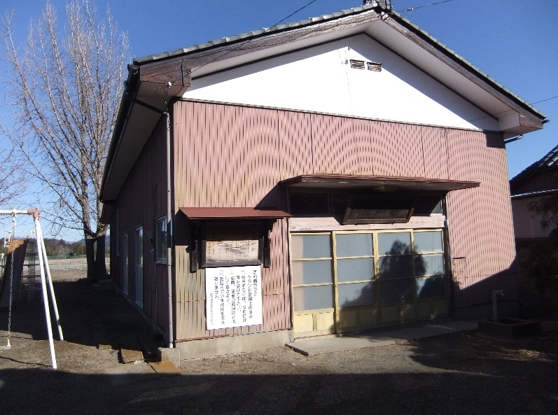 茨城県常陸太田市小目町の黒澤酉蔵の生地跡に建つ酉和館